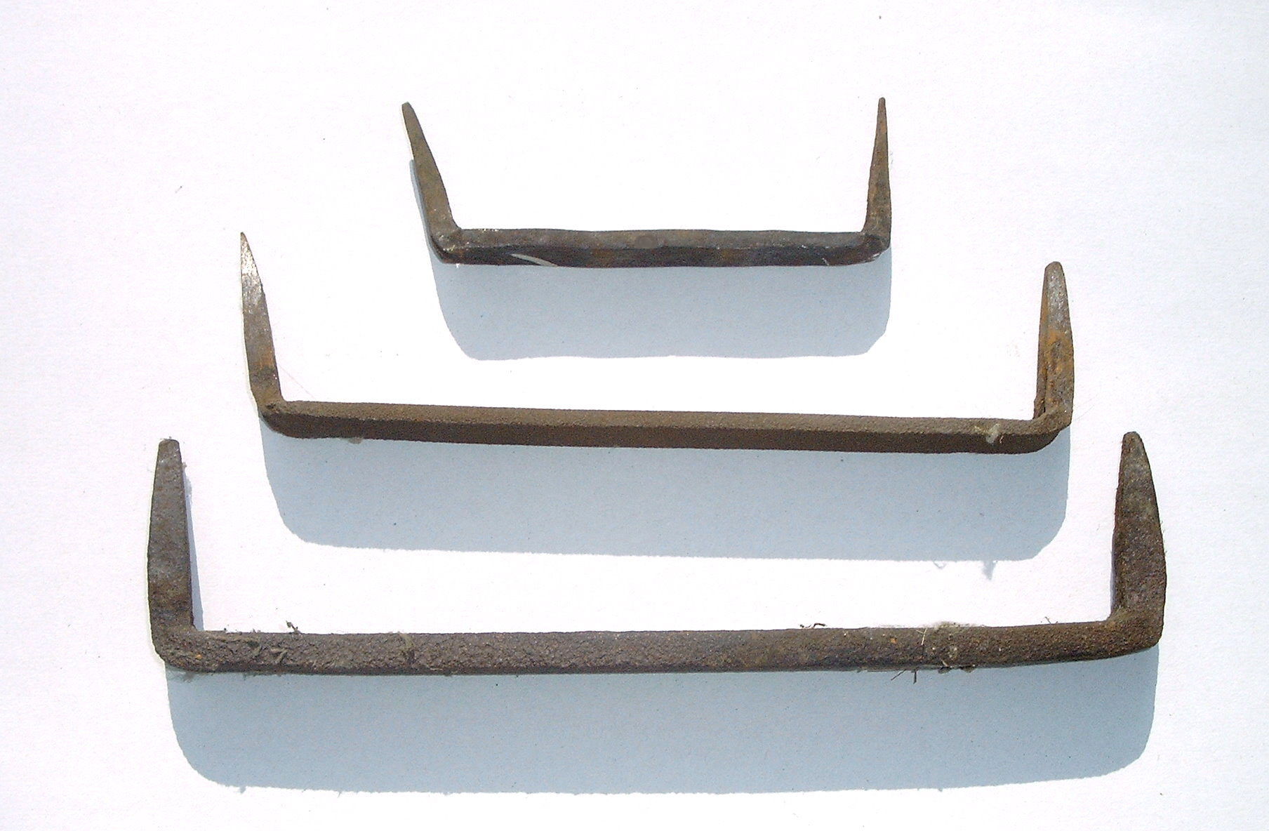 3 alte geschmiedete Bauklammern